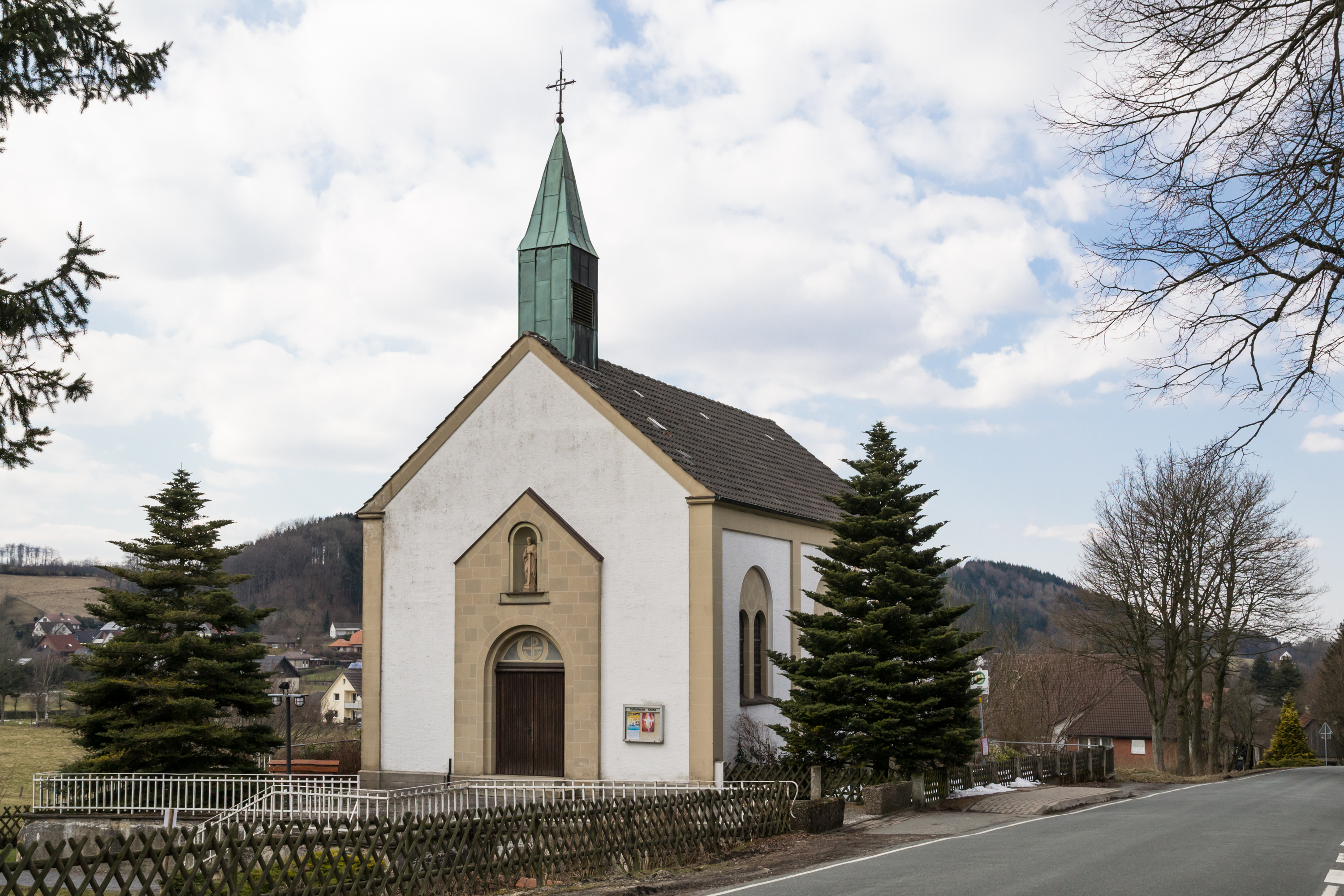 Kapelle St. Josef in Feldrom